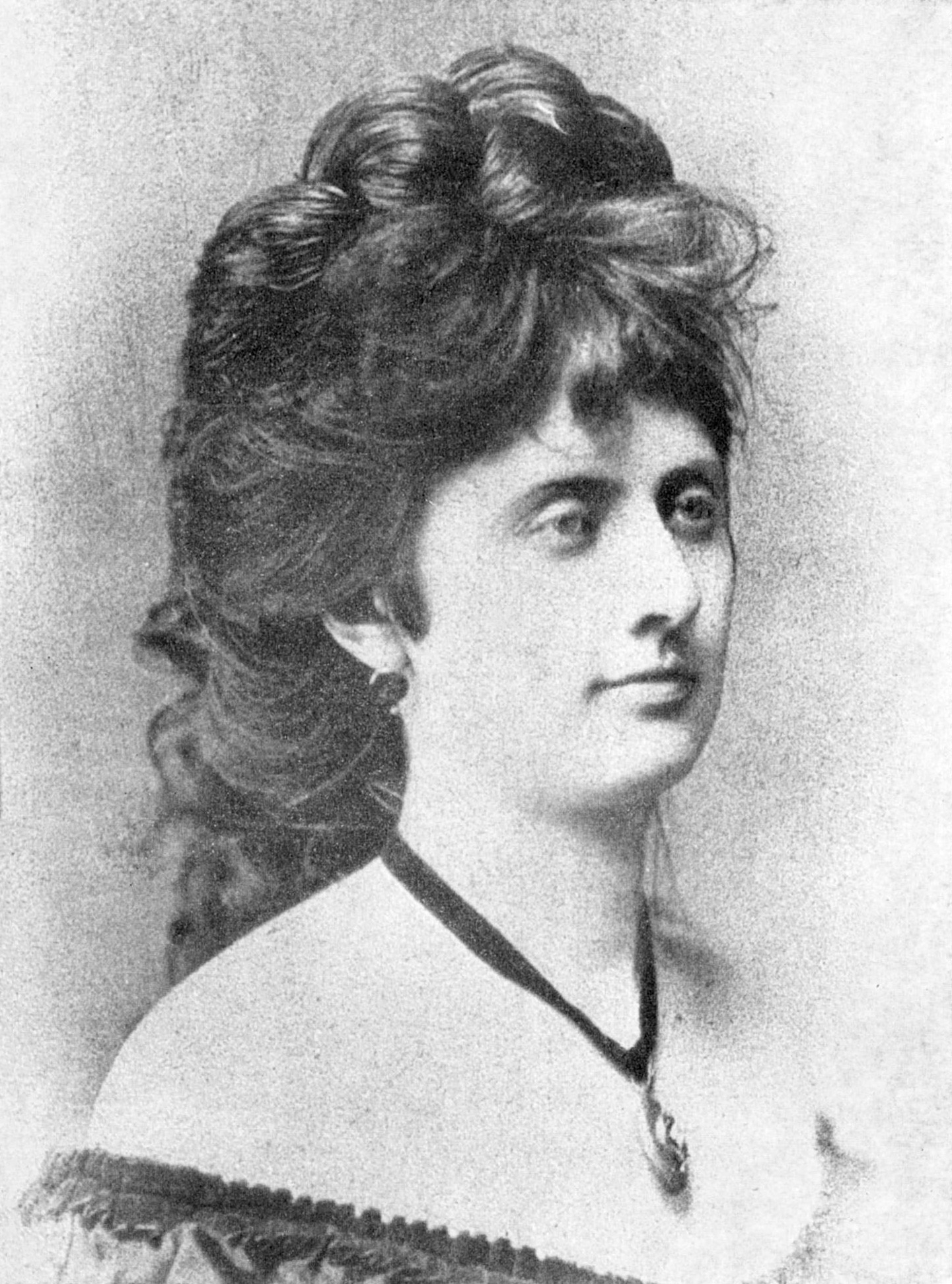 Maria Weidenhoffer (1837-1910) in 1857, wife of Ignaz Semmelweis